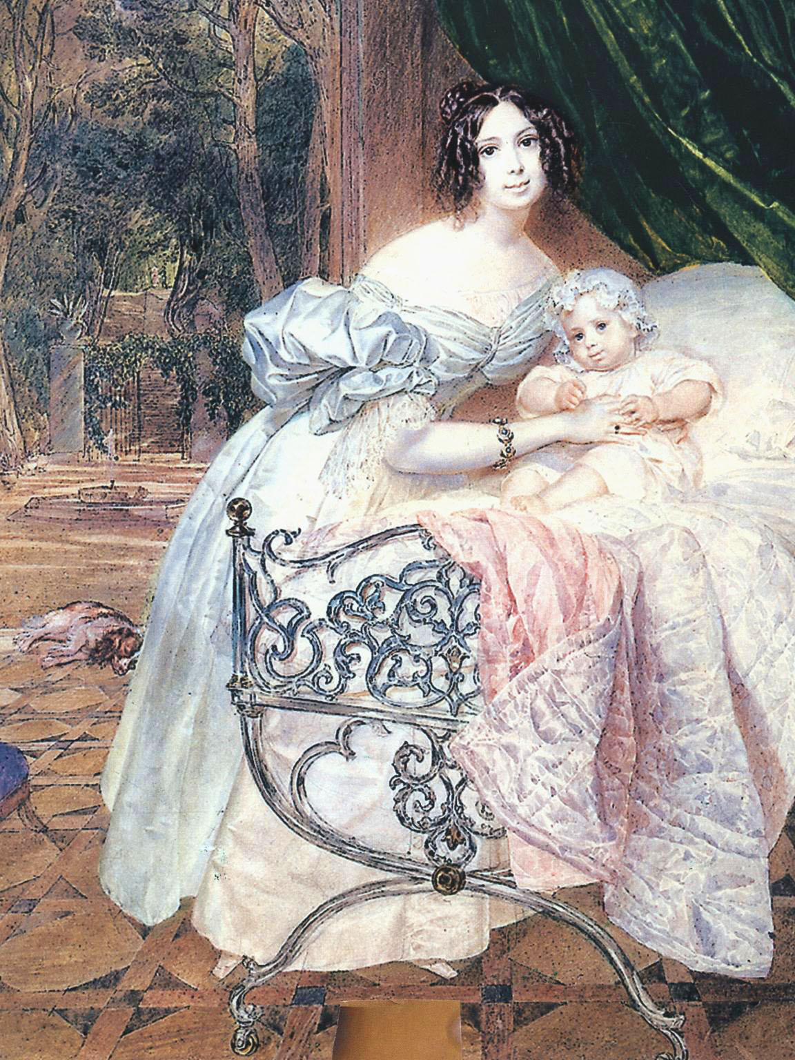 Мария Иренеевна Бутенева, ур. Хрептович (1811-1890), дочь гофмейстера графа И.Е. Хрептовича; с 1834 года вторая жена дипломата Аполлинария (Аполлона) Петровича Бутенев (1787-1866), изображена с дочерью Марией (1835-1905), была замужем за капитаном 1-го ранга князем В.И. Барятинским.